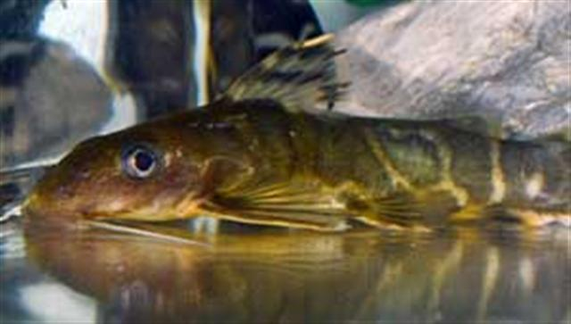 Synodontis brichardi USA, aquarium specimen-wild fish from Congo